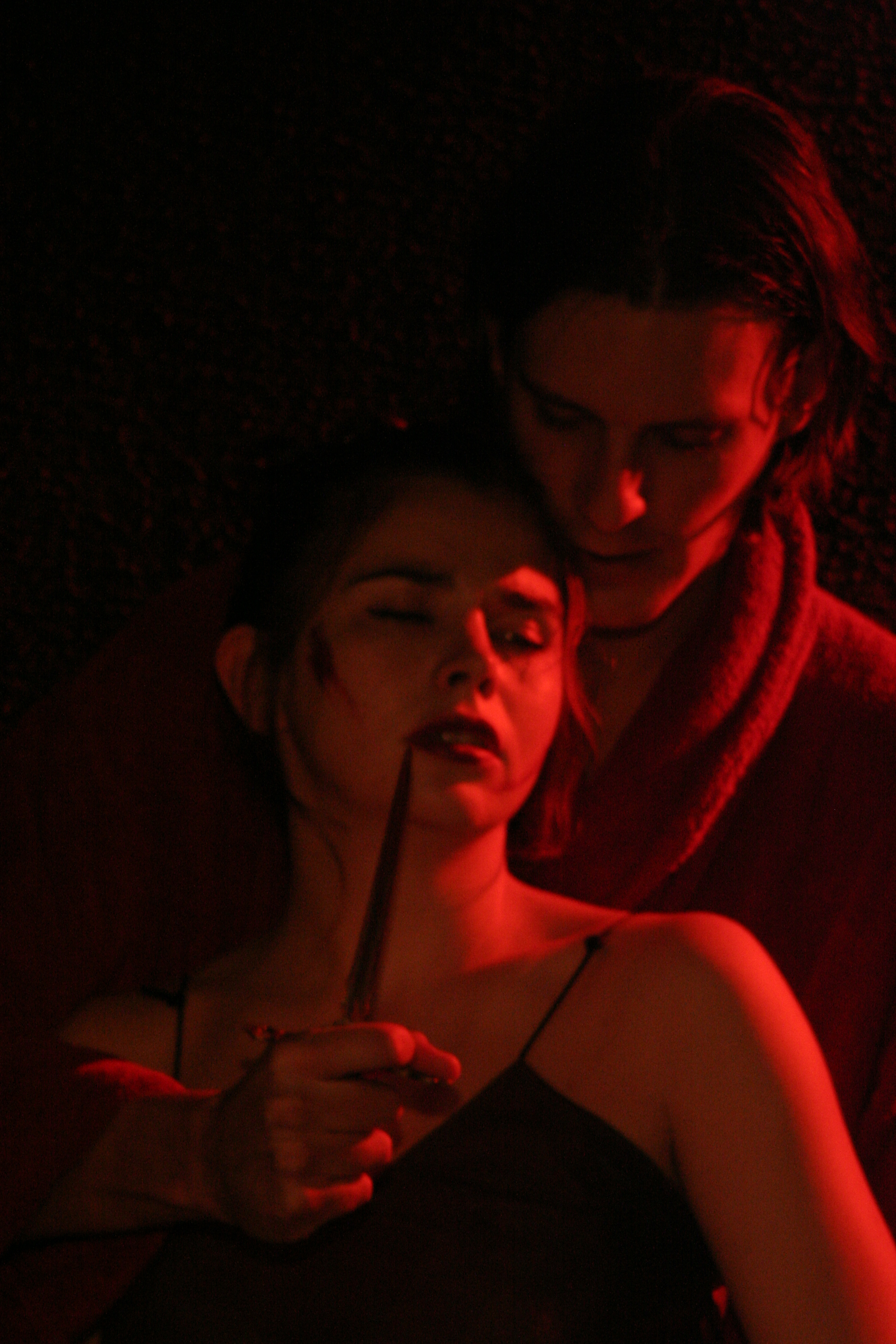 Médée et Jason, extrait du spectacle